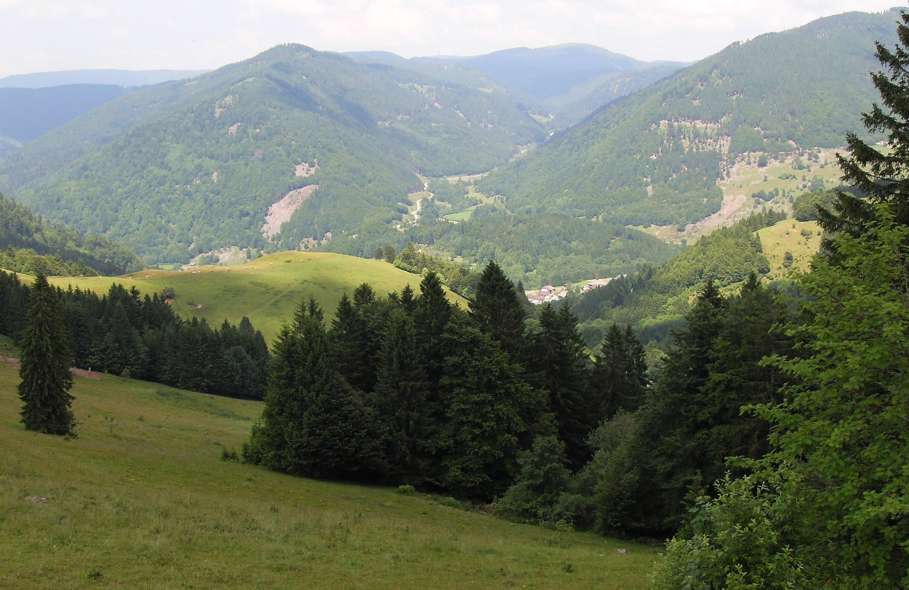 Blick vom Weißenbachsattel an der Straße Präg-Todtmoos auf den Gletscherkessel Präg, Schwarzwald, Deutschland